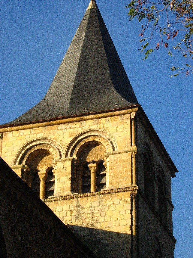 Abbaye de Graville, Le Havre ; source : photographie personnelle de l'Utilisateur Urban, prise en octobre 2004, GFDL. Urban octobre 2004